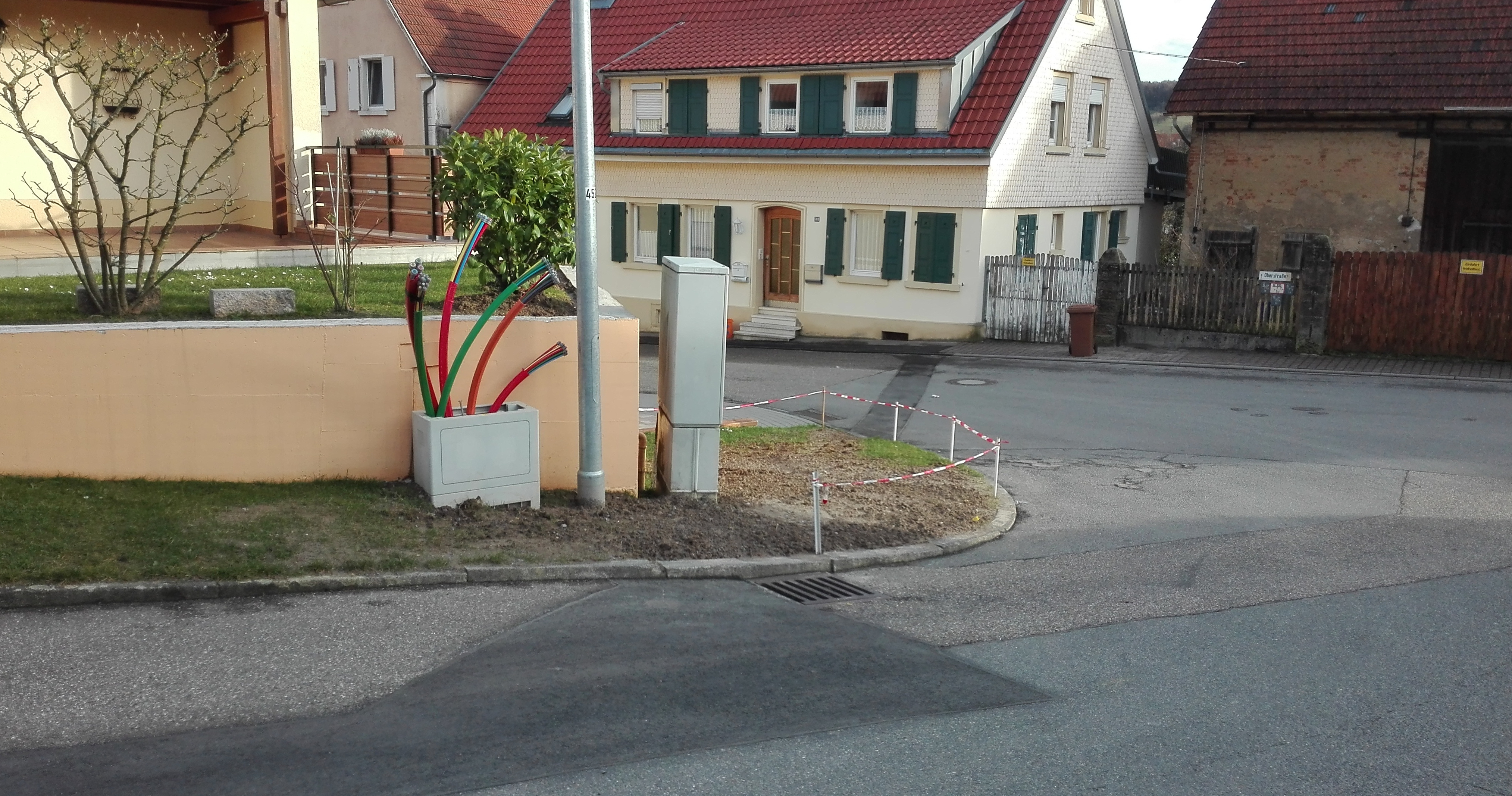 Kabel für den Breitbandausbau in Eschelbronn